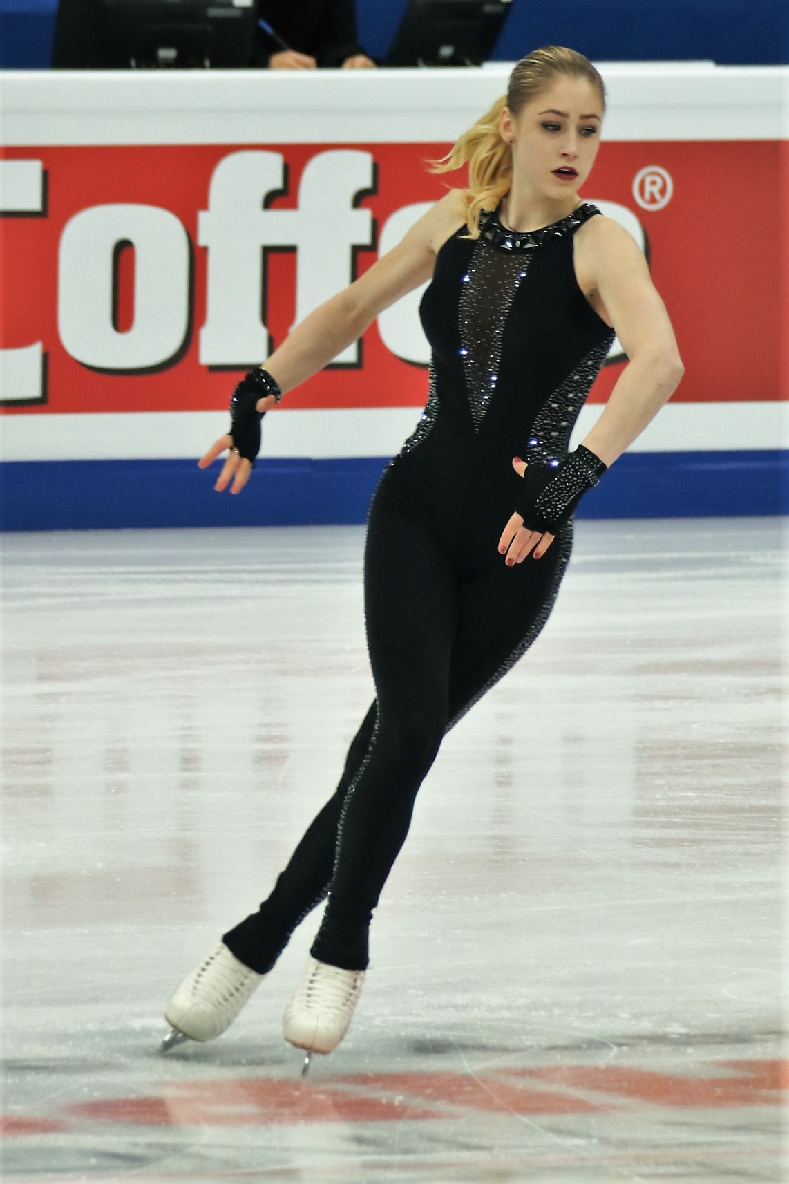 Диана Никитина (Латвия) на Чемпионате Европы по фигурному катанию 2018